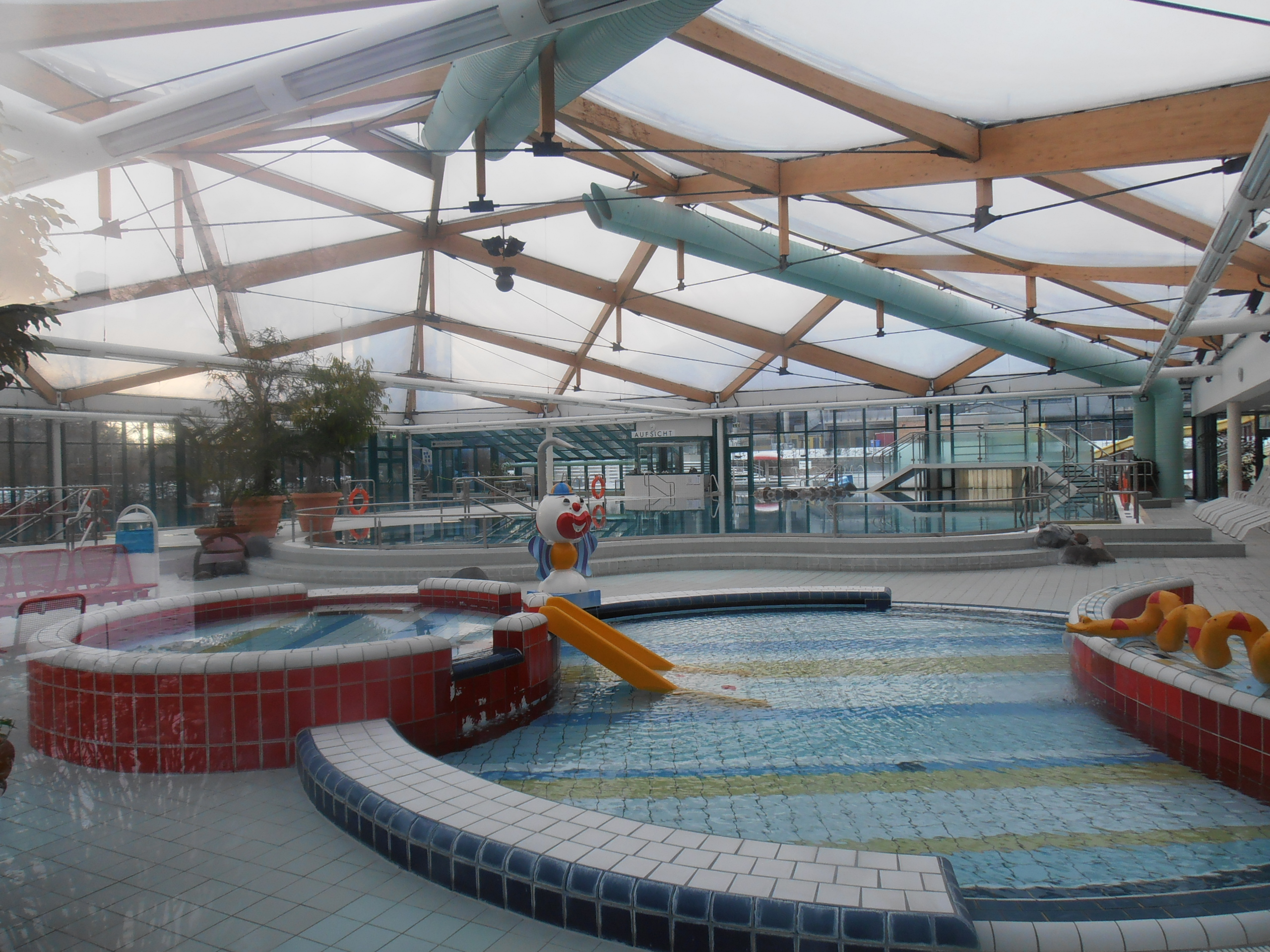 Badebereich Georg-Arnhold-Bad (östlicher Teil)